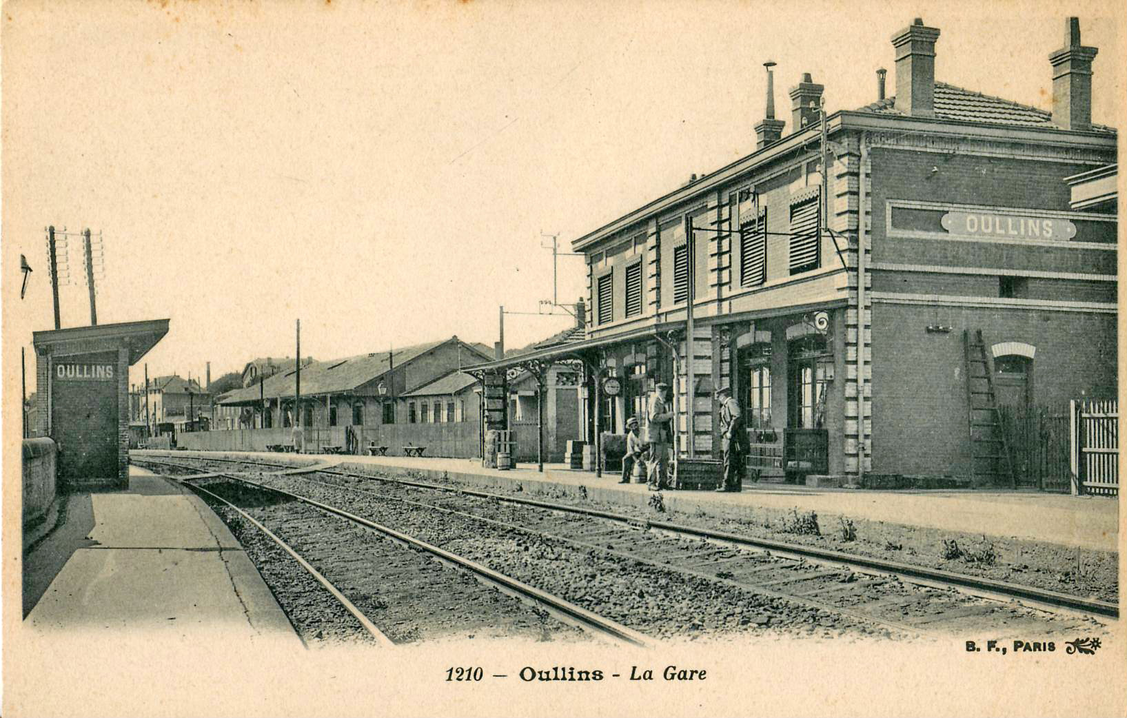 Carte postale ancienne éditée par BF à Paris, n°1210 : OULLINS - la Gare